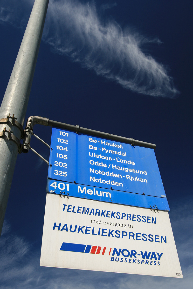 Gamle og nye skilt som viser rutenumre og destinasjoner på Landmannstorget i Skien. Det øverste skiltet var forlengst utdatert da bildet ble tatt.